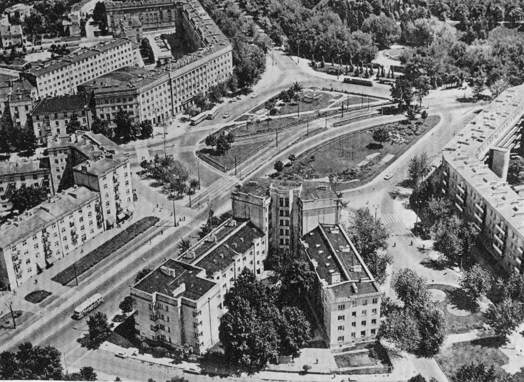 Plac Komuny Paryskiej (obecnie Wilsona) w Warszawie